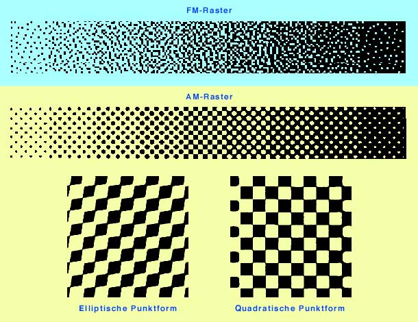 Description=Rasterpunktformen Source=Archiv Lengwiler Author=Grafik Lengwiler Date=19.8.2006